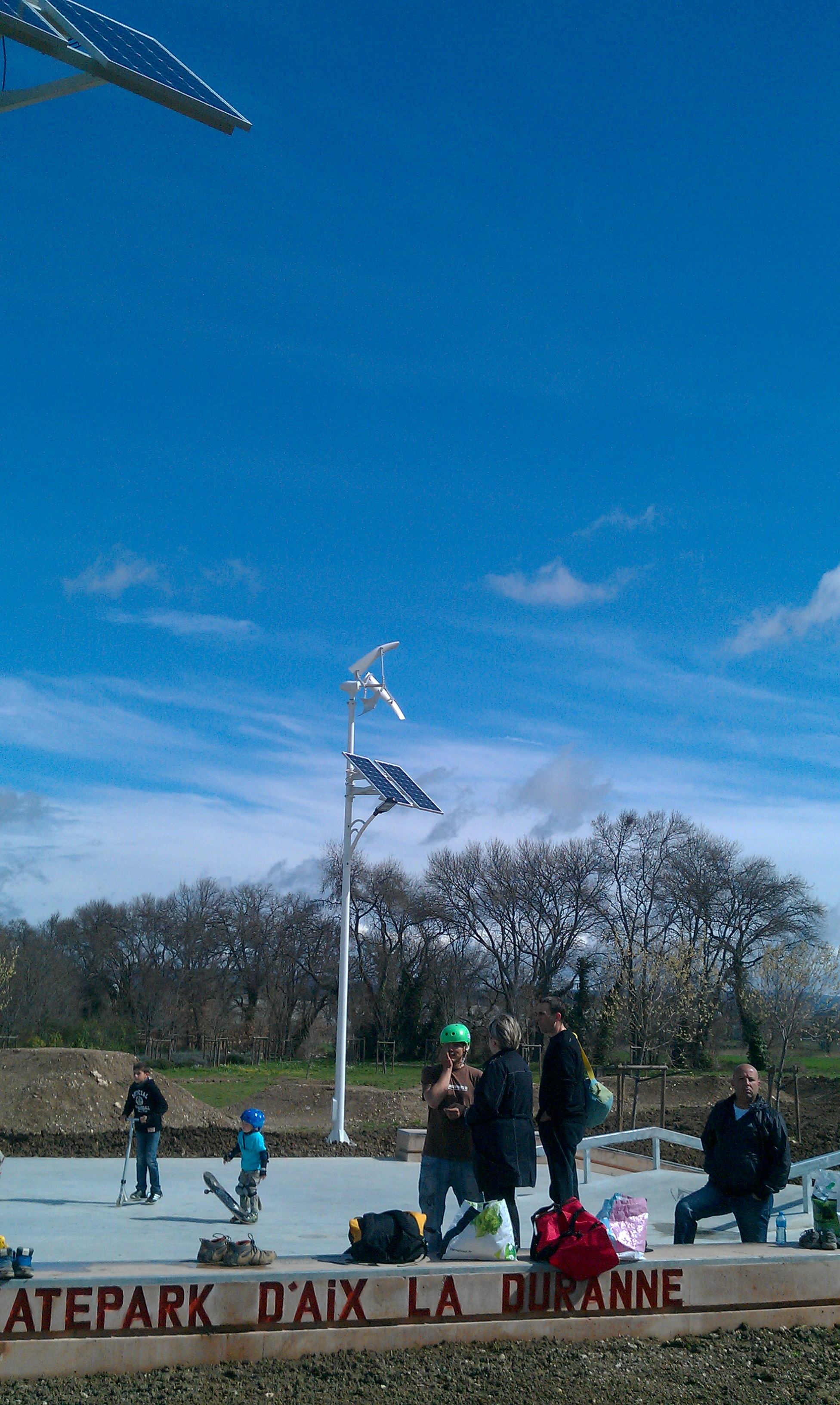 Lampadaire autonome hybride Nheolight Duranne Aix en Provence